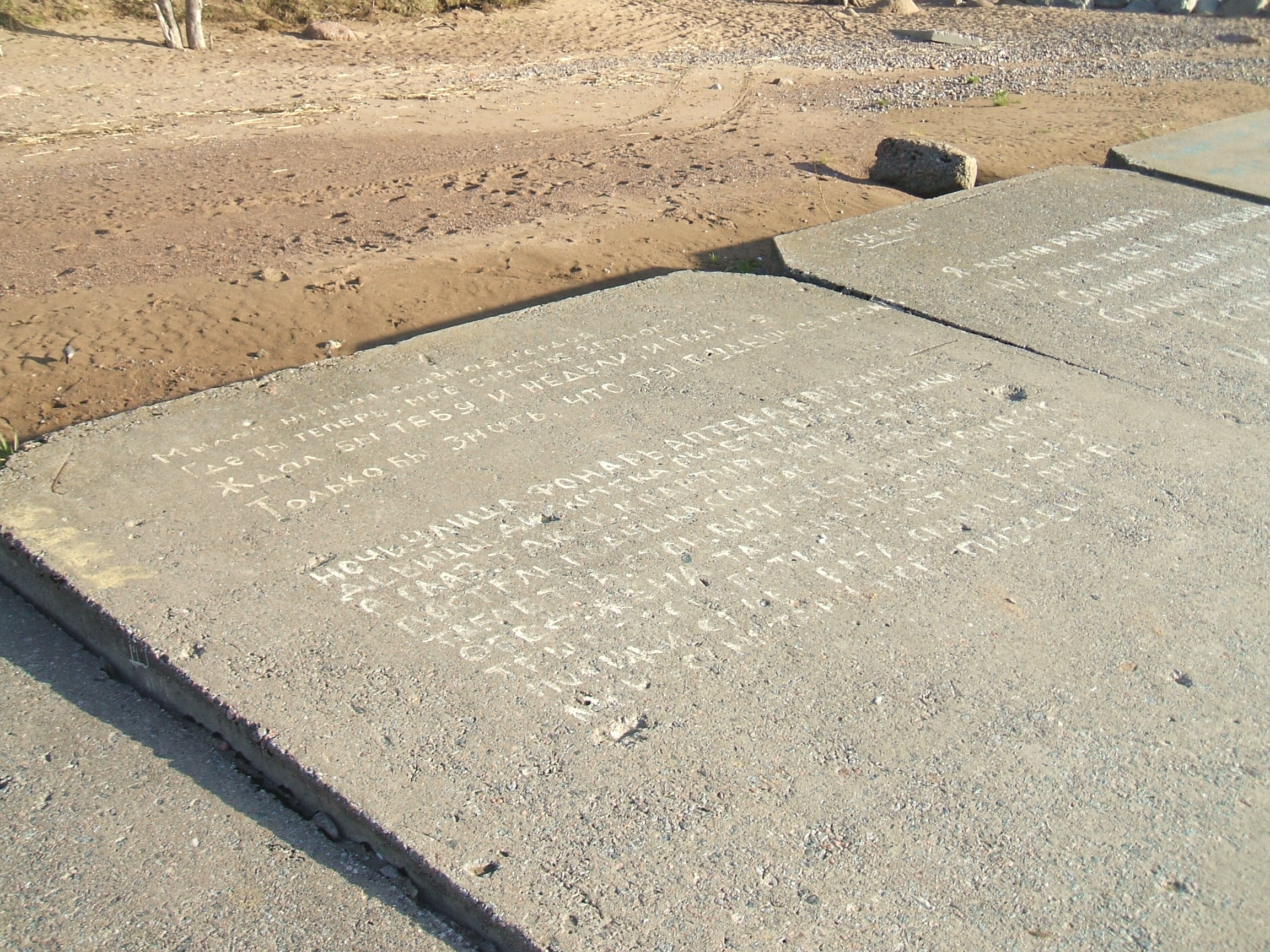 Сестрорецкие Дубки СПб. Мыс. Надписи на бетонных плитах размытой набережой.